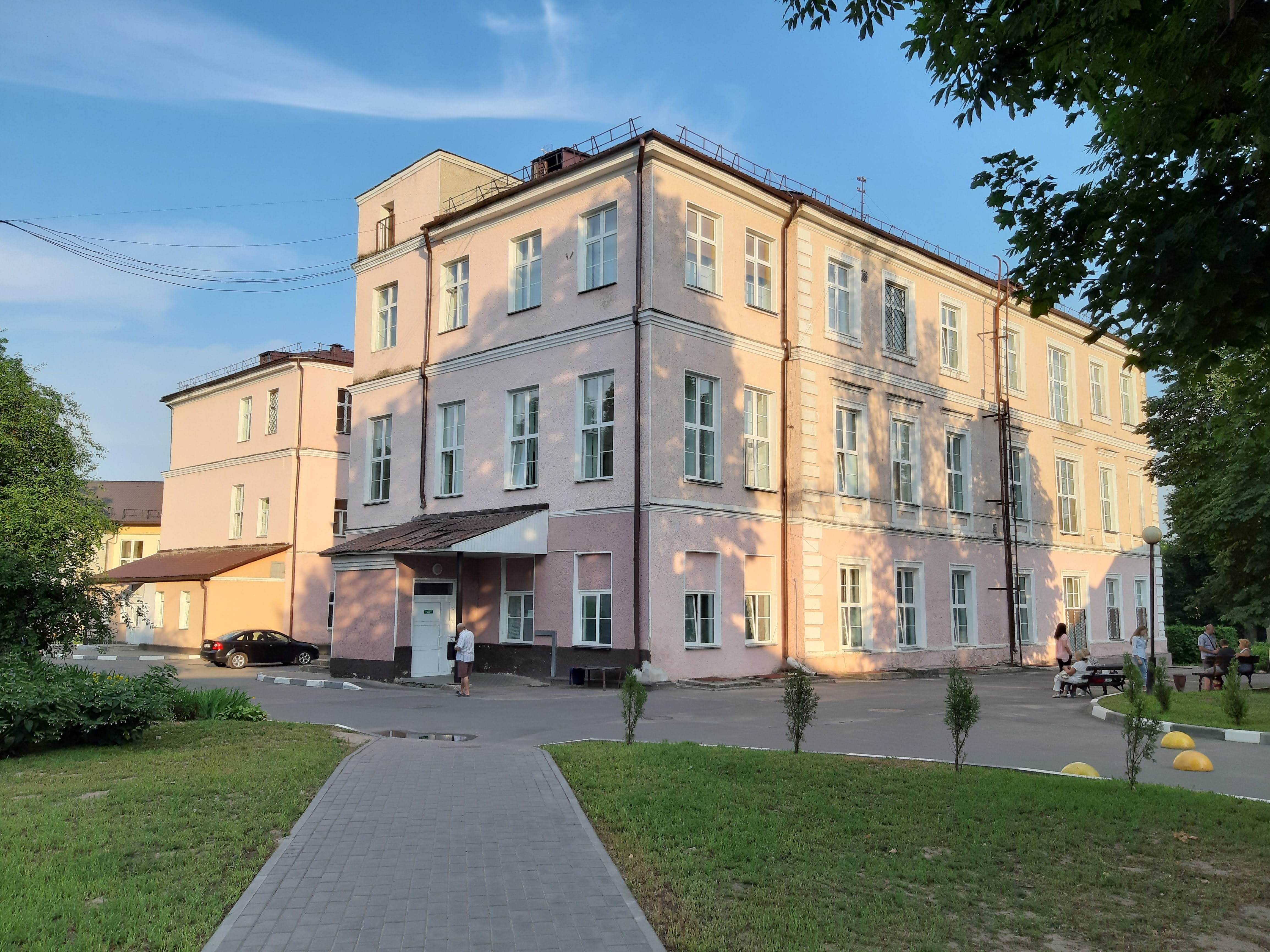 Магілёў. Гарадская бальніца